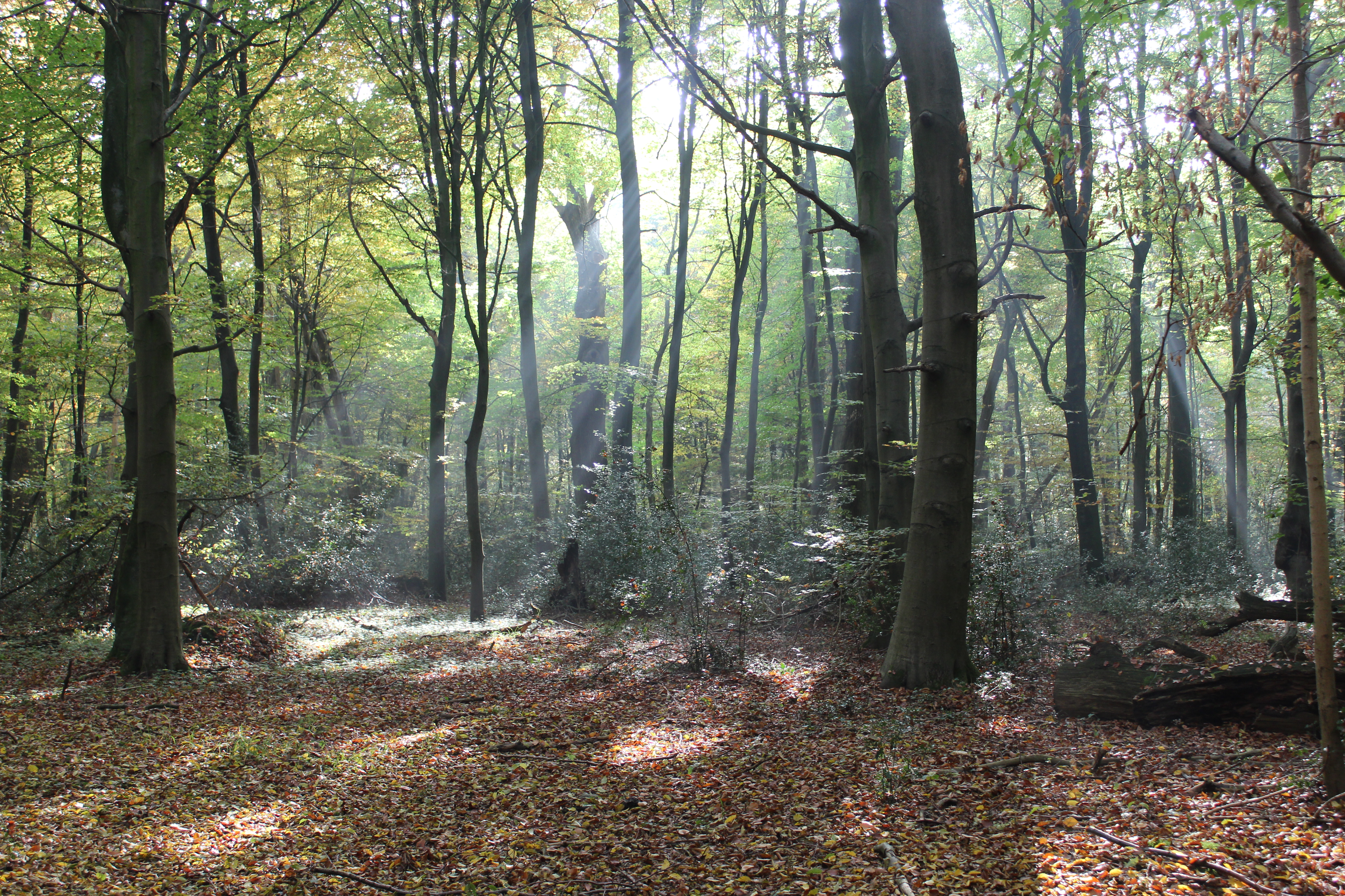 Das Laubdach durchbrechende Lichtstrahlen im Hasbruch